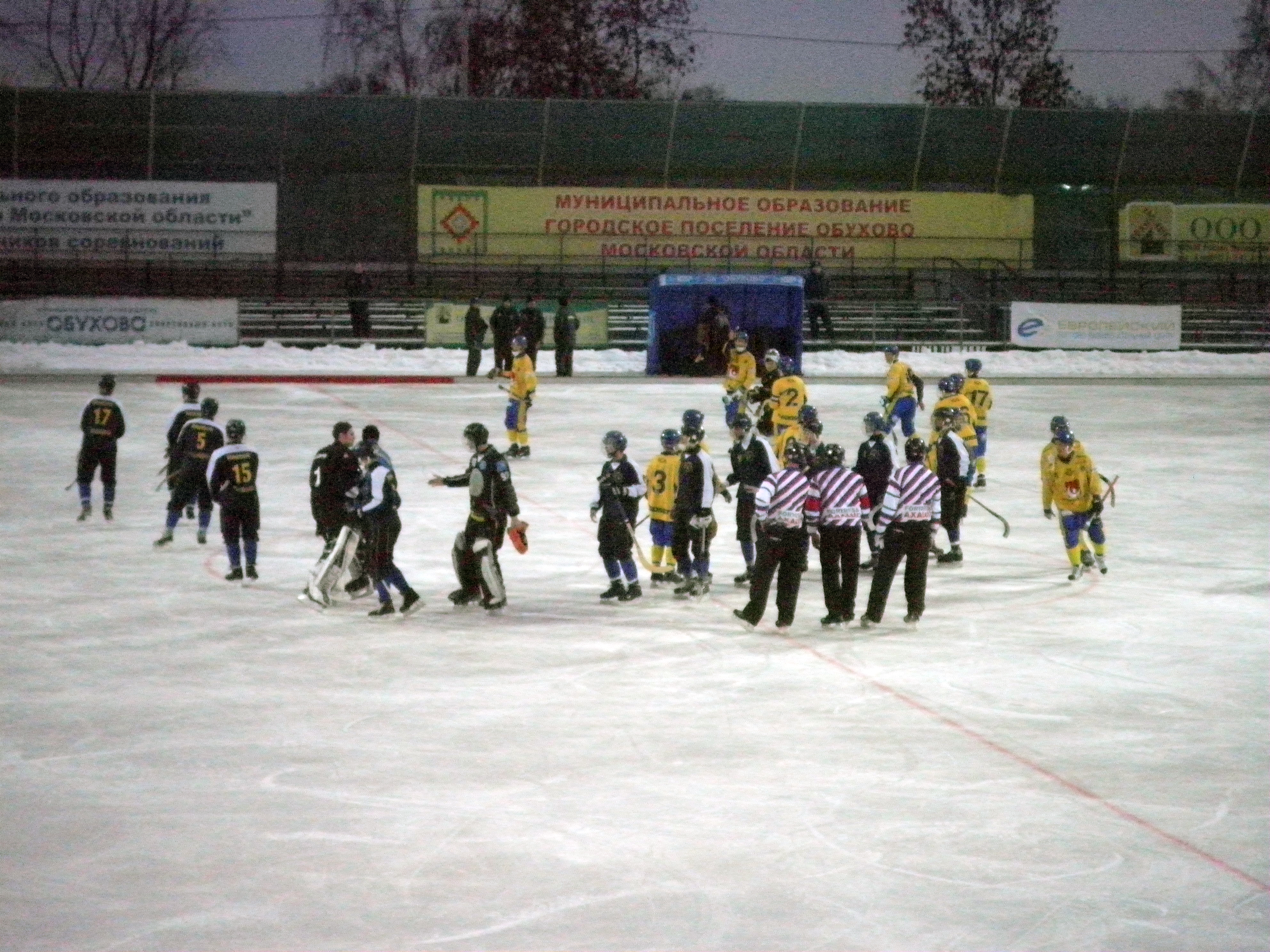 Чемпионат мира по хоккею с мячом среди молодёжных команд 2011. Полуфинал. Матч Швеция—Казахстан.